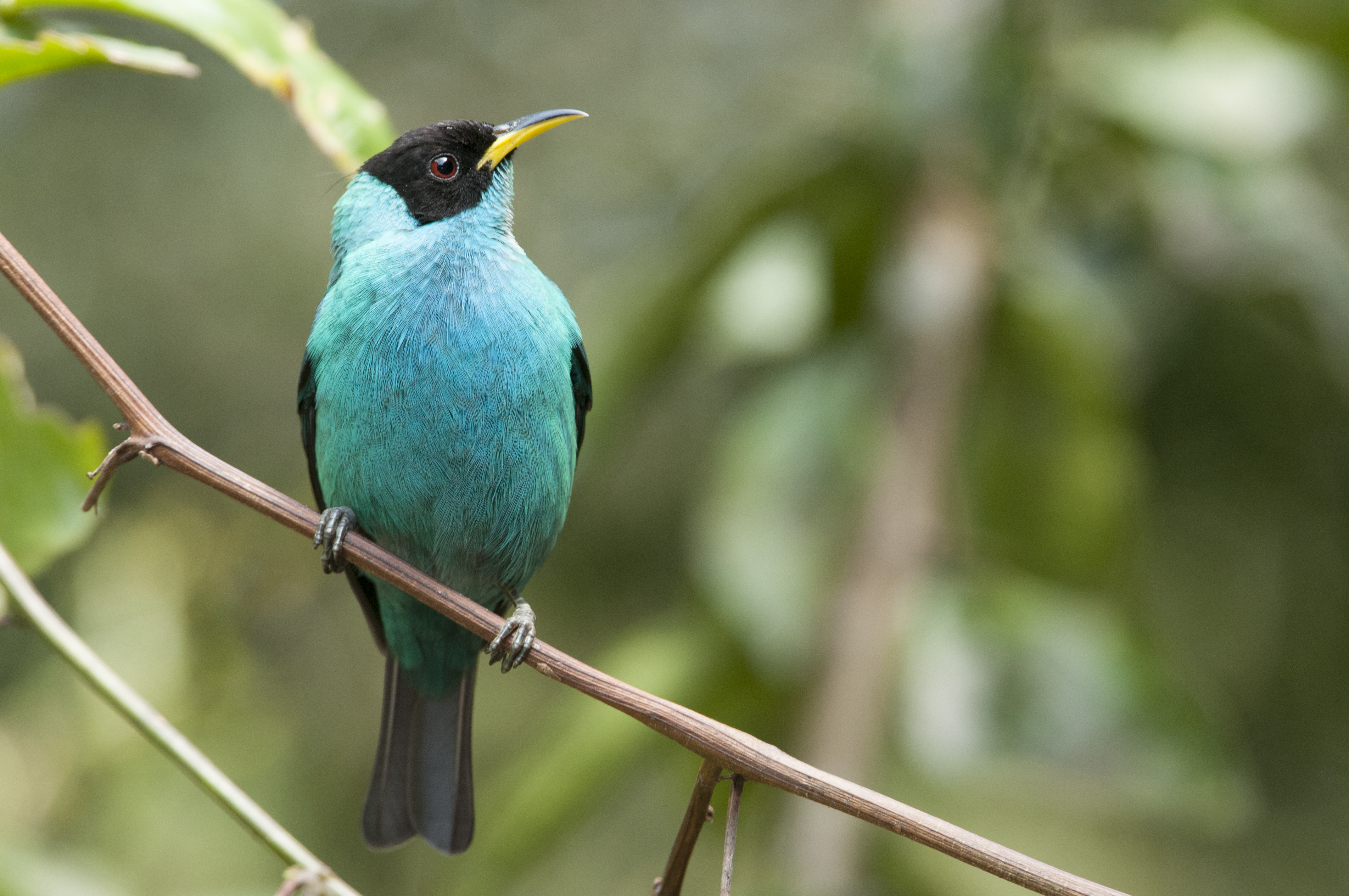 Saí verde - Chlorophanes spiza, espécie encontrada na Mata Atlântica e Amazônia, alimenta-se de frutos, insetos e do néctar de flores.